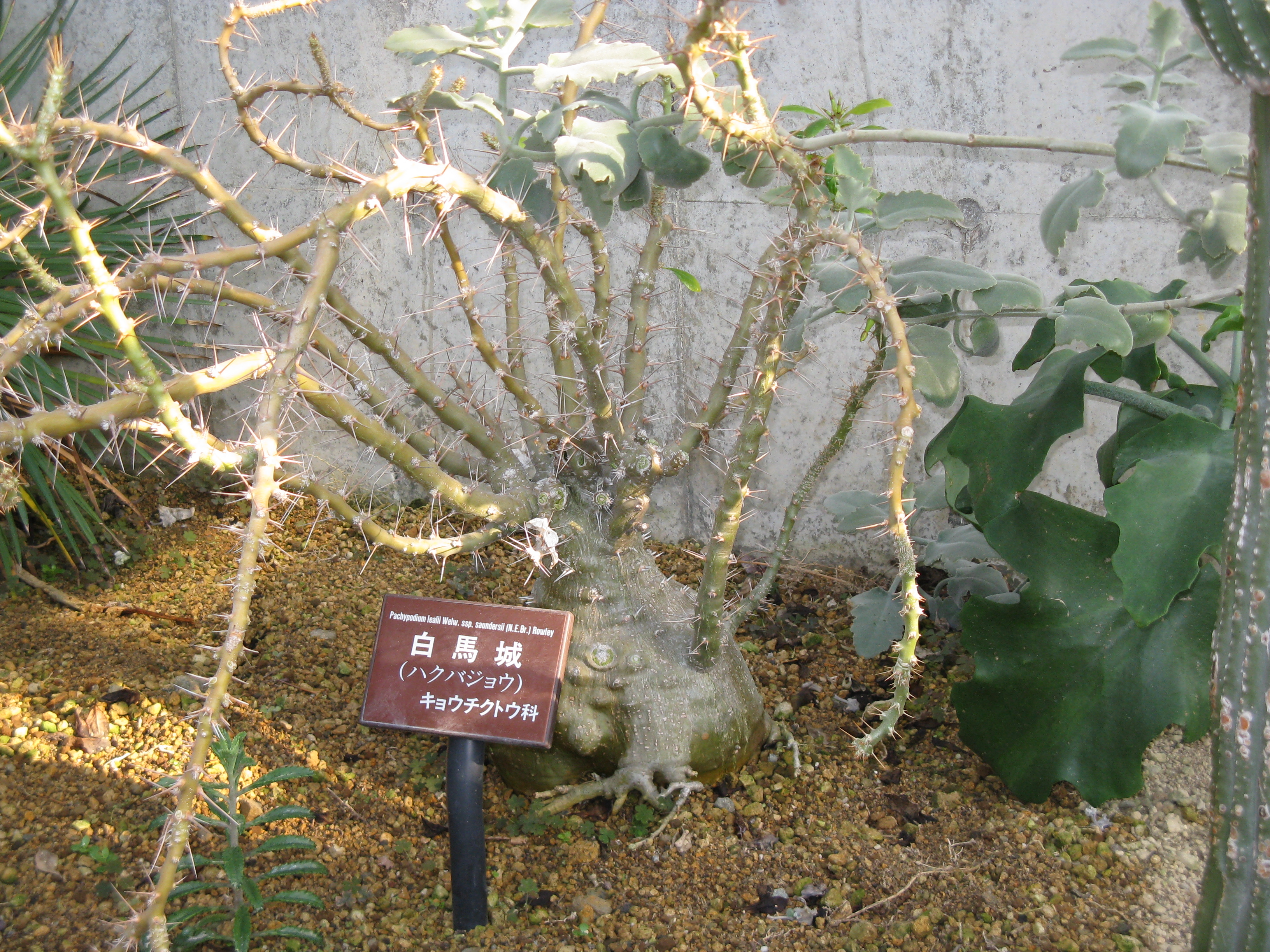 Pachypodium lealii ssp. saundersii Place:Osaka Prefectural Flower Garden,Osaka,Japan